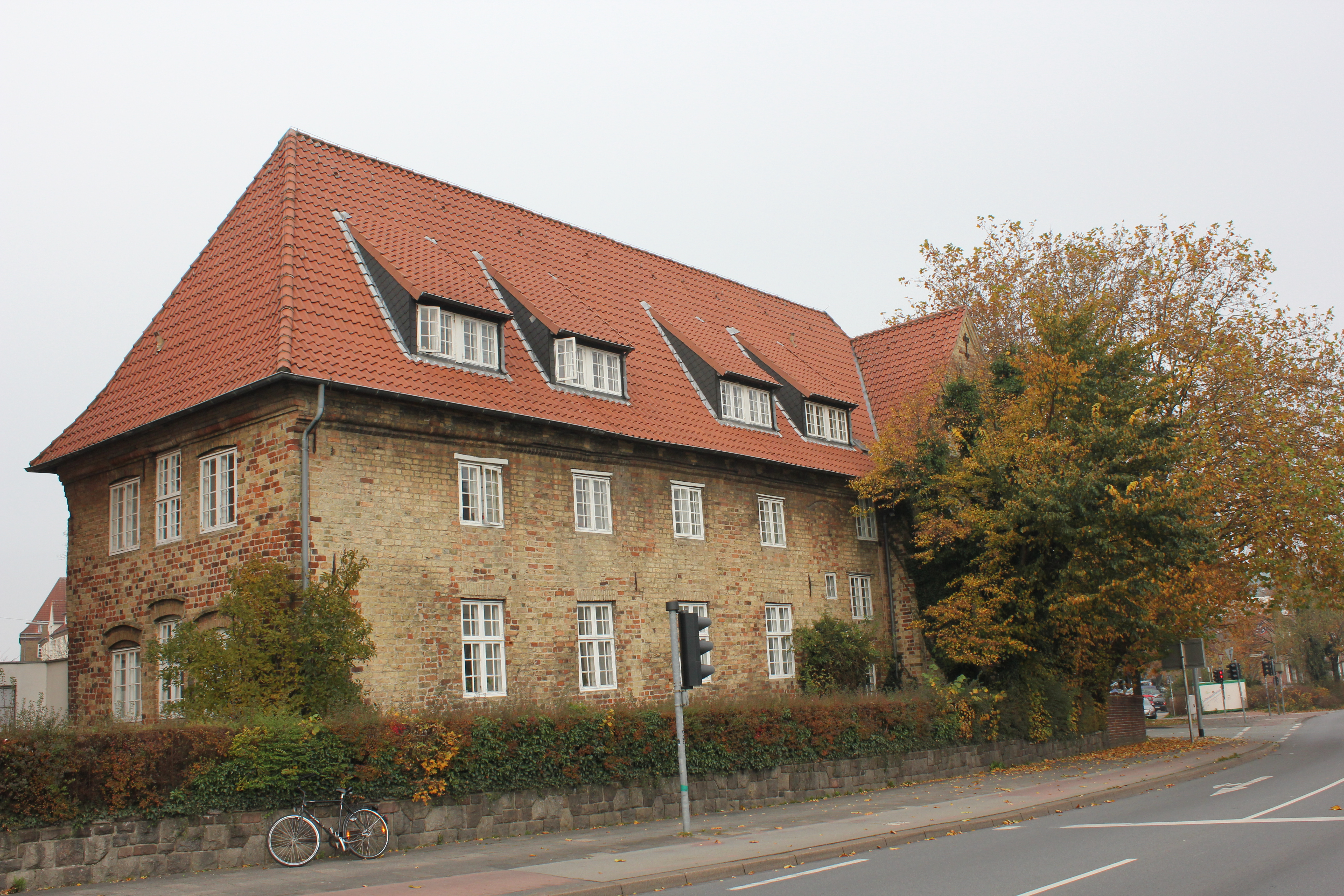 Hospital und Kloster zum Heiligen Geist